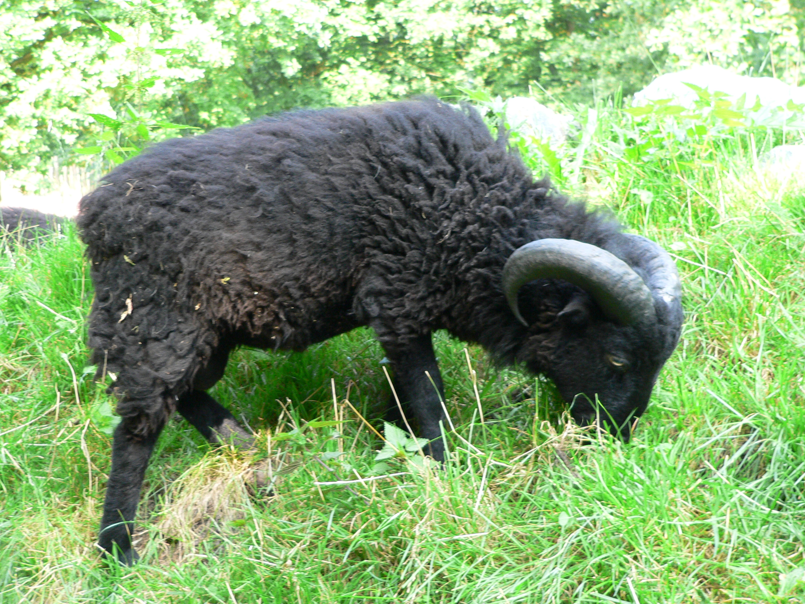 Ouessant Sheep